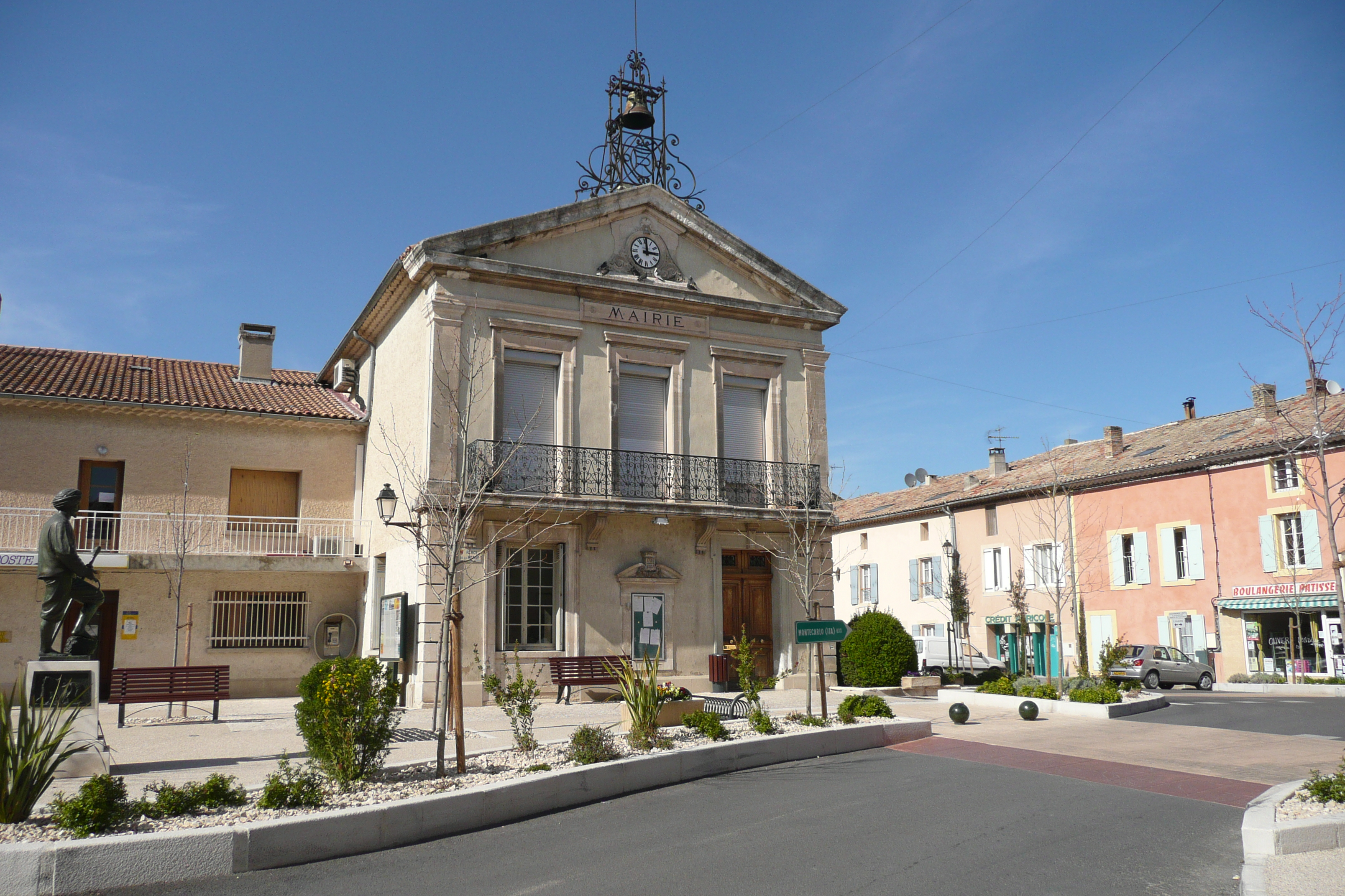 Mairie à Athen des Paluds.